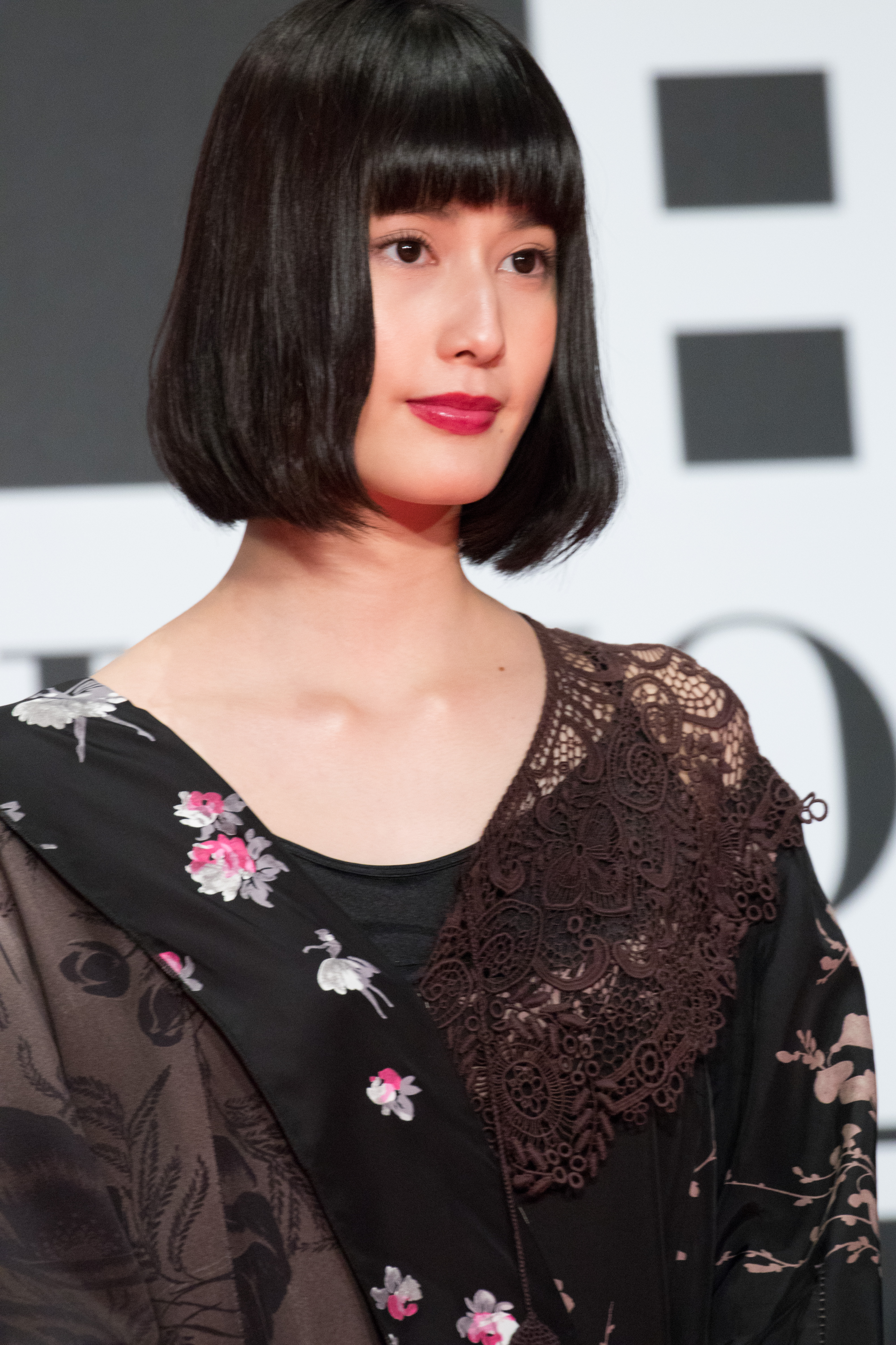 第29回 東京国際映画祭 オープニングセレモニー 橋本愛 (うつくしいひと)